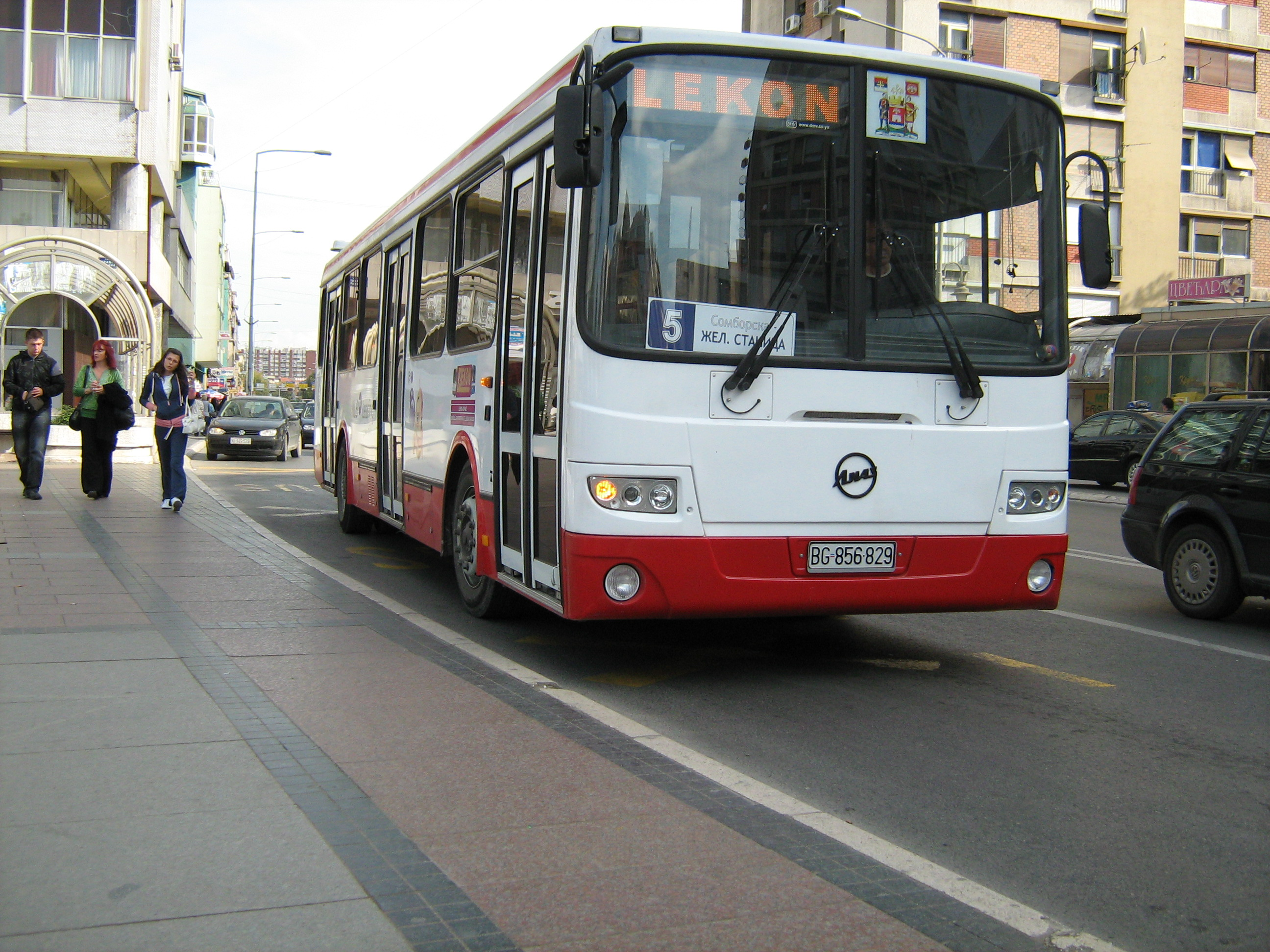 Аутобус Лиаз 5256, превозника Лекон на линији 5 (Сомборска-Железничка станица)у центру града Ниша